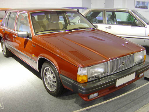 Volvo 760, first generation (sedanmodell)